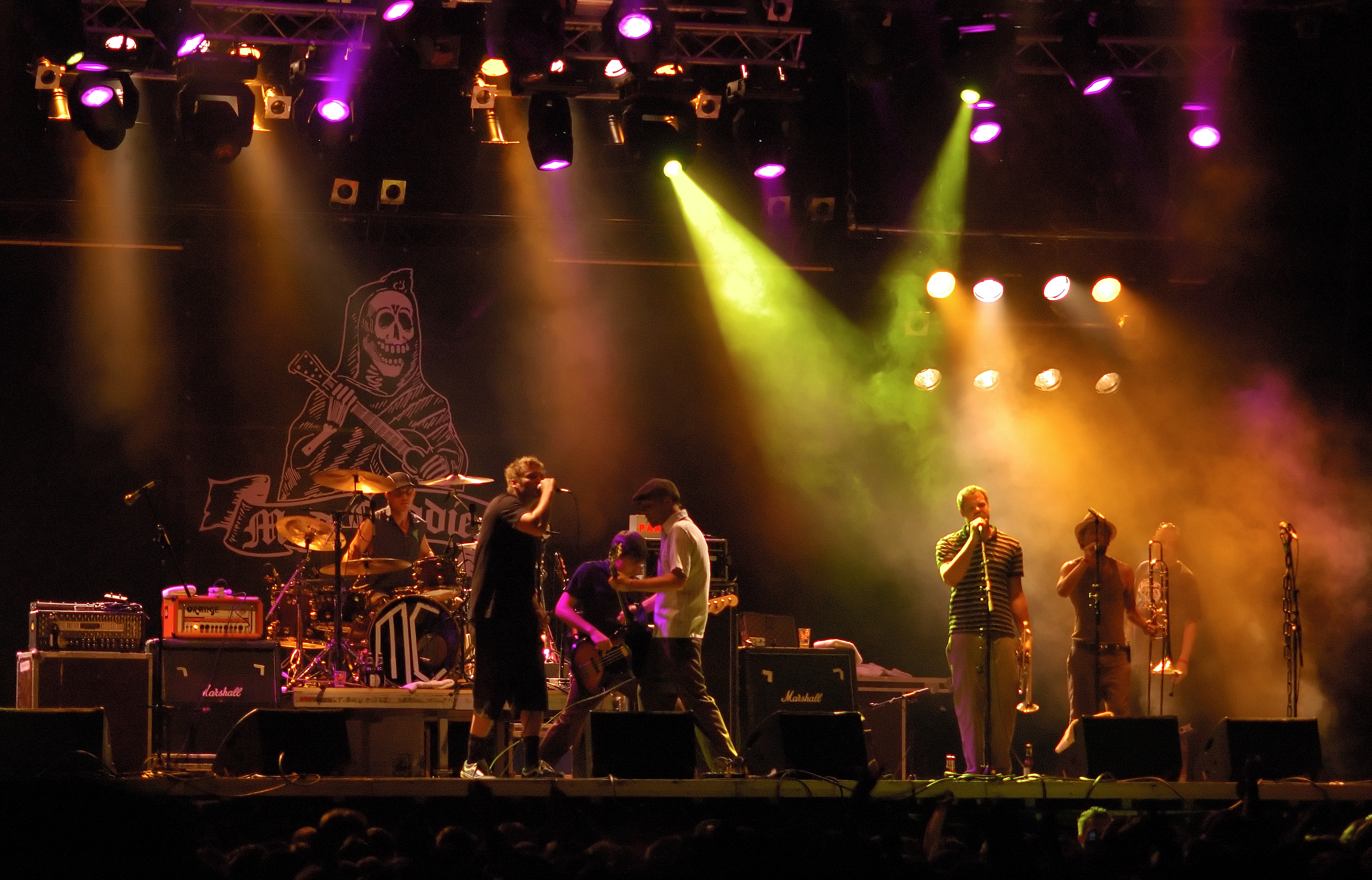 Auftritt der Mad Caddies auf dem Rheinkultur Festival 2006 in Bonn